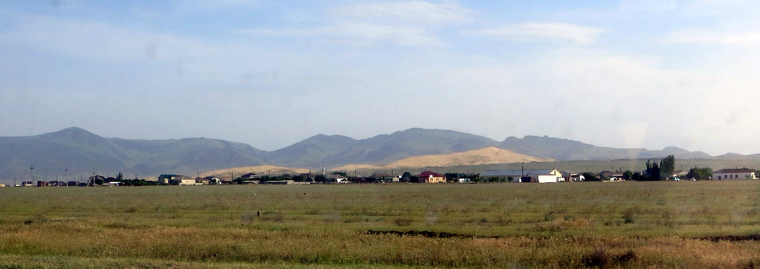 Бархан Сары-Кум